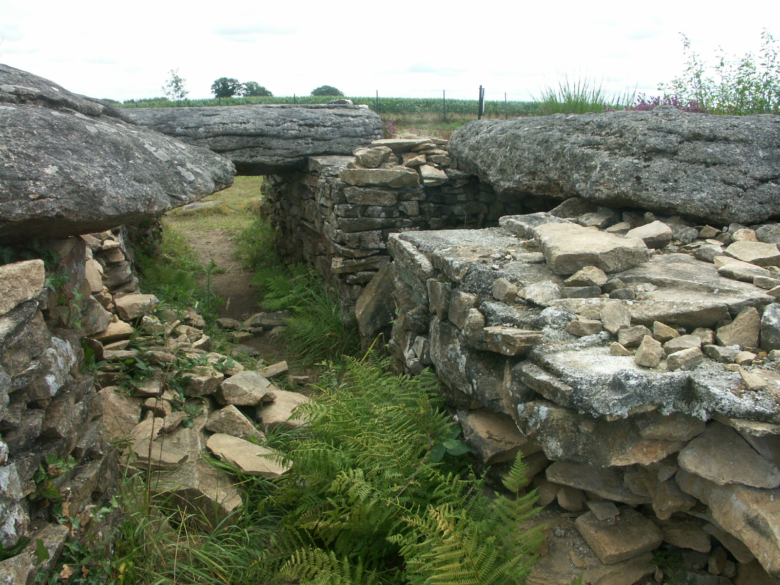 Cairn II du site de Larcuste à Colpo (Morbihan) - Vue intérieure